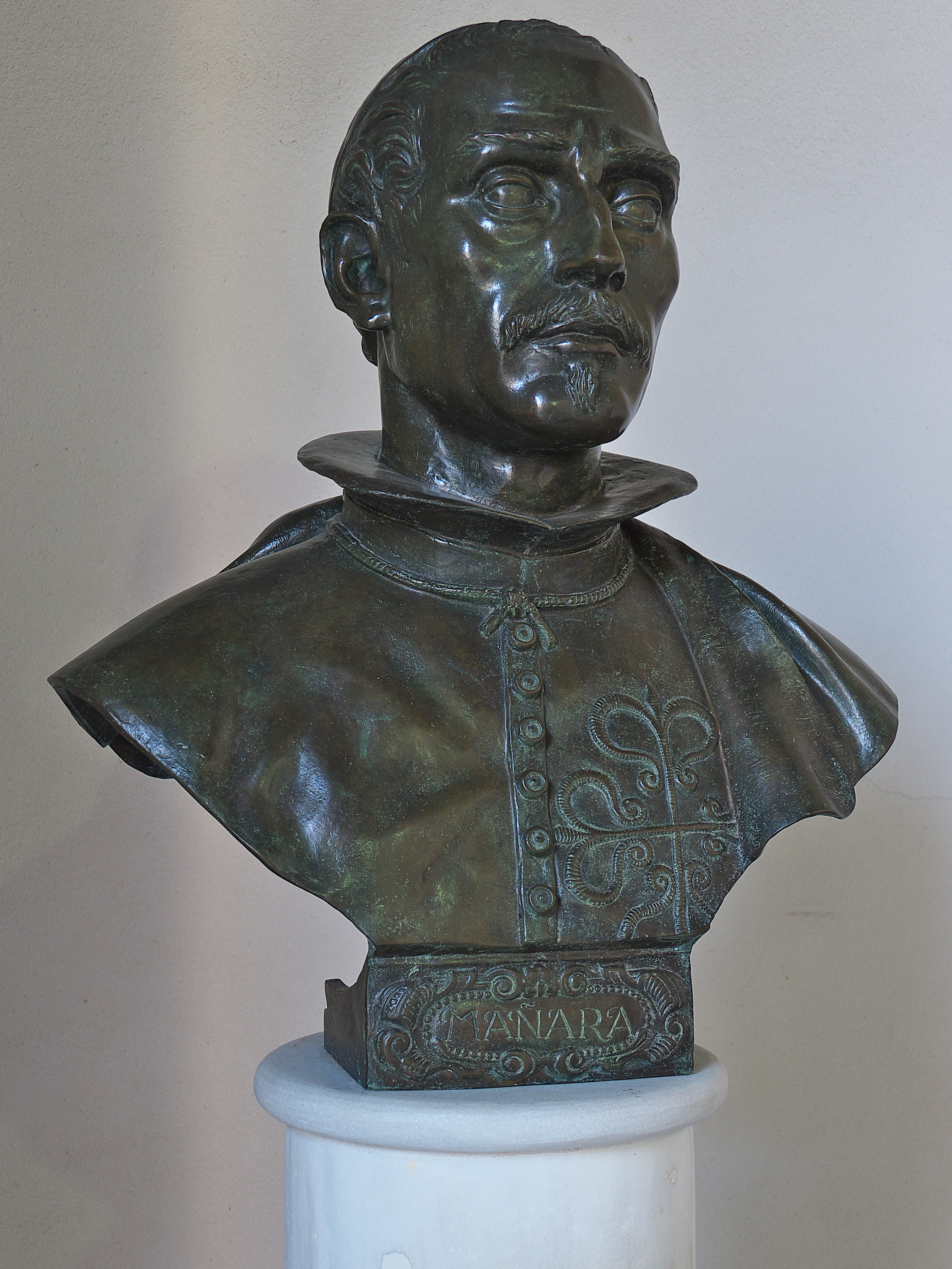 Obra de José Lafita Díaz para el Hospital de la Caridad (Sevilla)